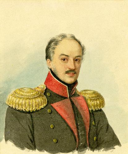 Граф Павел Дмитриевич Киселёв (1788-1872), генерал, гос. и воен. деятель.